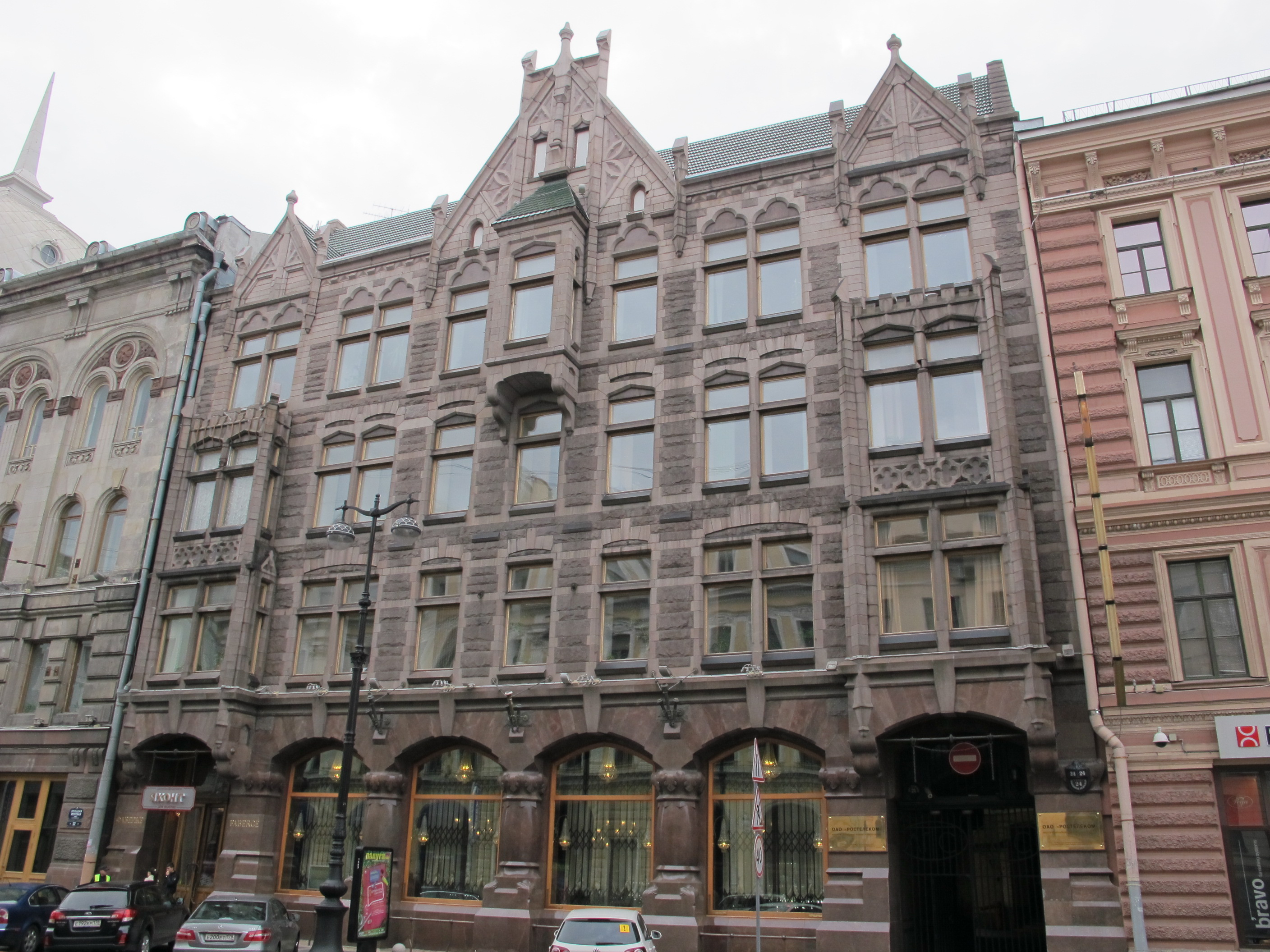 Санкт-Петербург. Большая Морская ул., 24. Здание ювелирной фирмы К. Г. Фаберже. 1899—1900. Архитектор Карл Шмидт